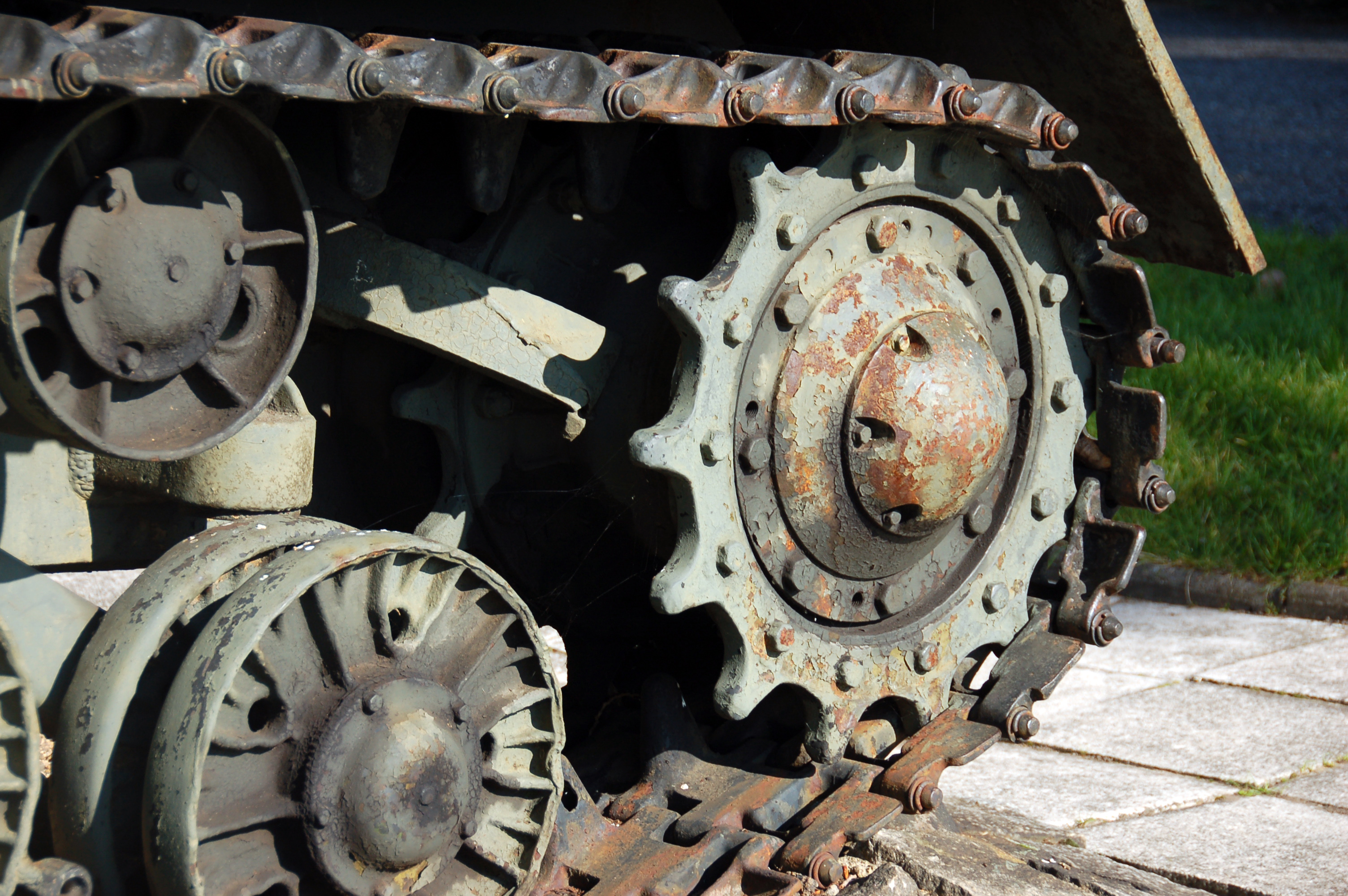 polnisches Oderbruch bei Siekierki